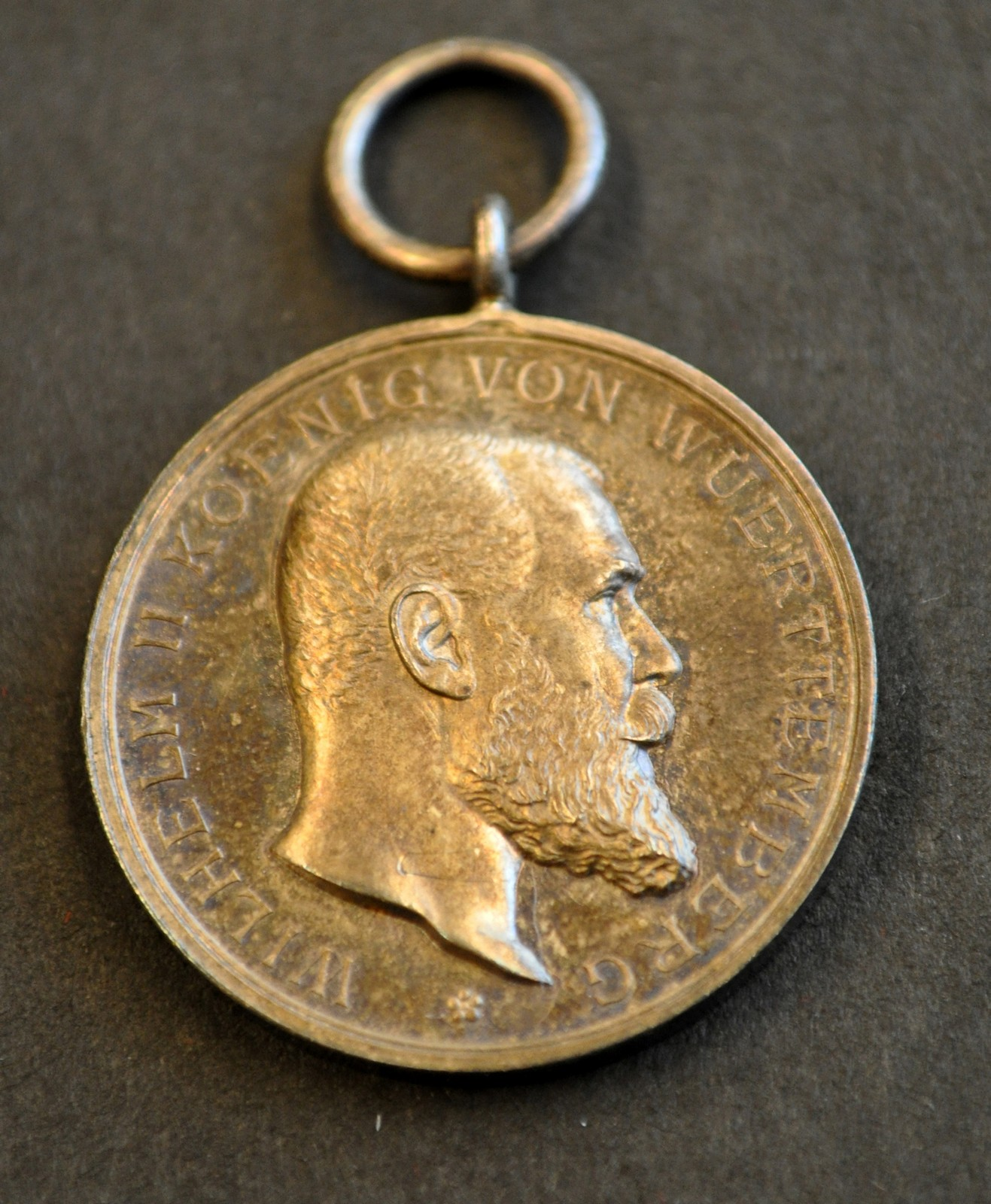 Fritz (Friedrich) Kehrer, geb.: 09.08.1890 Tübingen, war zunächst Lehrer in Wart / Nagold. Er wurde Leutnant d. Reserve und Adjutant im Württembergischen Gebirgsbataillon, bei dem er zum Regiments-Stab (5. Komp) gehörte. Er starb am 27.05.1918 in der Schlacht von Chemin des Dames (Pargny). Fritz Kehrer erhielt in seiner Dienstzeit 2 Ordensspangen und 6 verschiedene Orden, darunter das Eiserne Kreuz 1. Klasse, die mit ihren originalen Behältern überliefert sind.